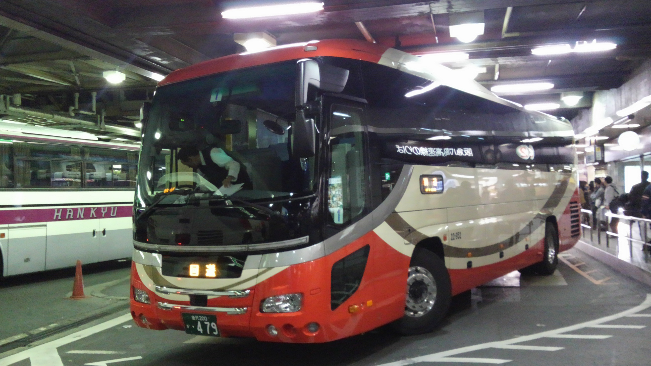 2012年夏から大阪－金沢線で使用される北鉄金沢バスのセレガ。北鉄グループの都市間高速車としては14年ぶりの日野車導入。